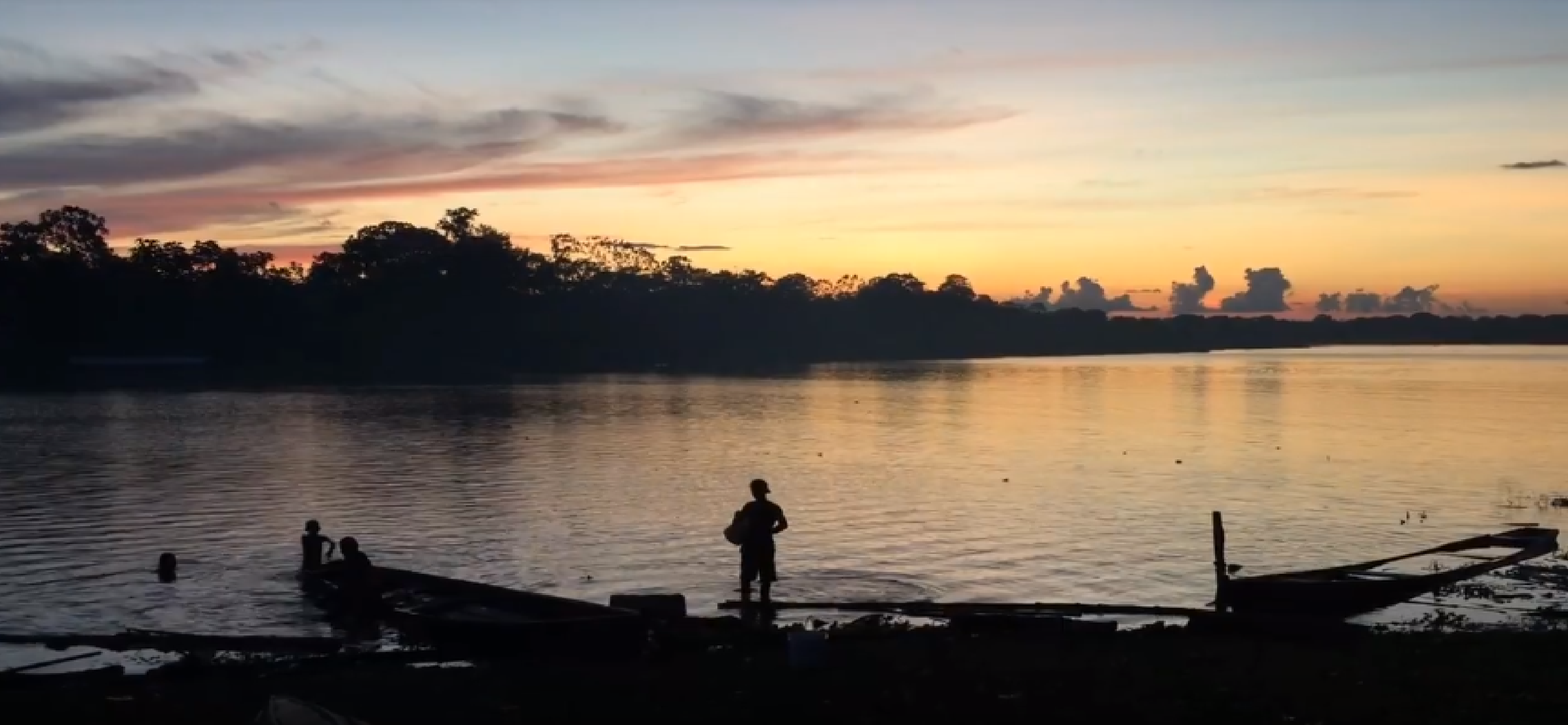 Río Loretoyacu en Puerto Nariño